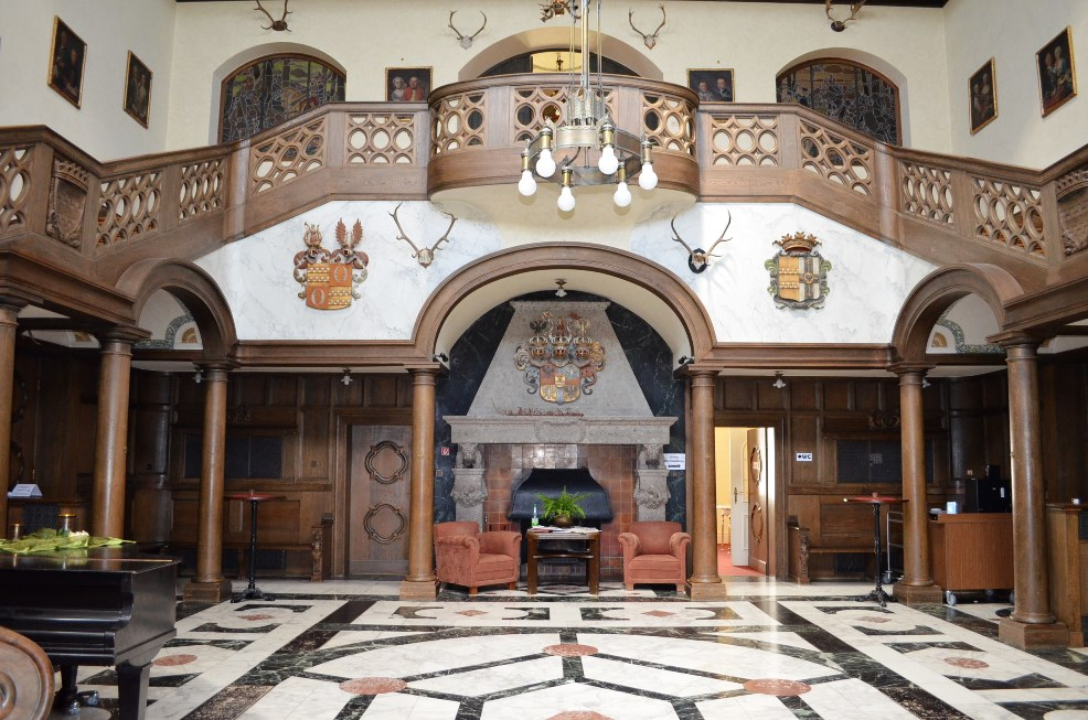 Kuppelhalle Schloss Craheim